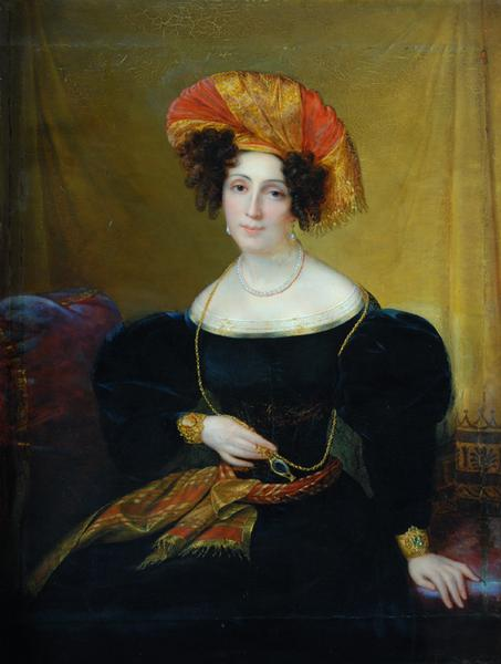 Portrait of Mademoiselle Mars